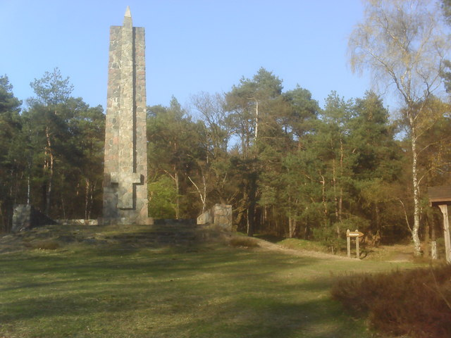 Kirchlinteln: Lindhoop-Denkmal